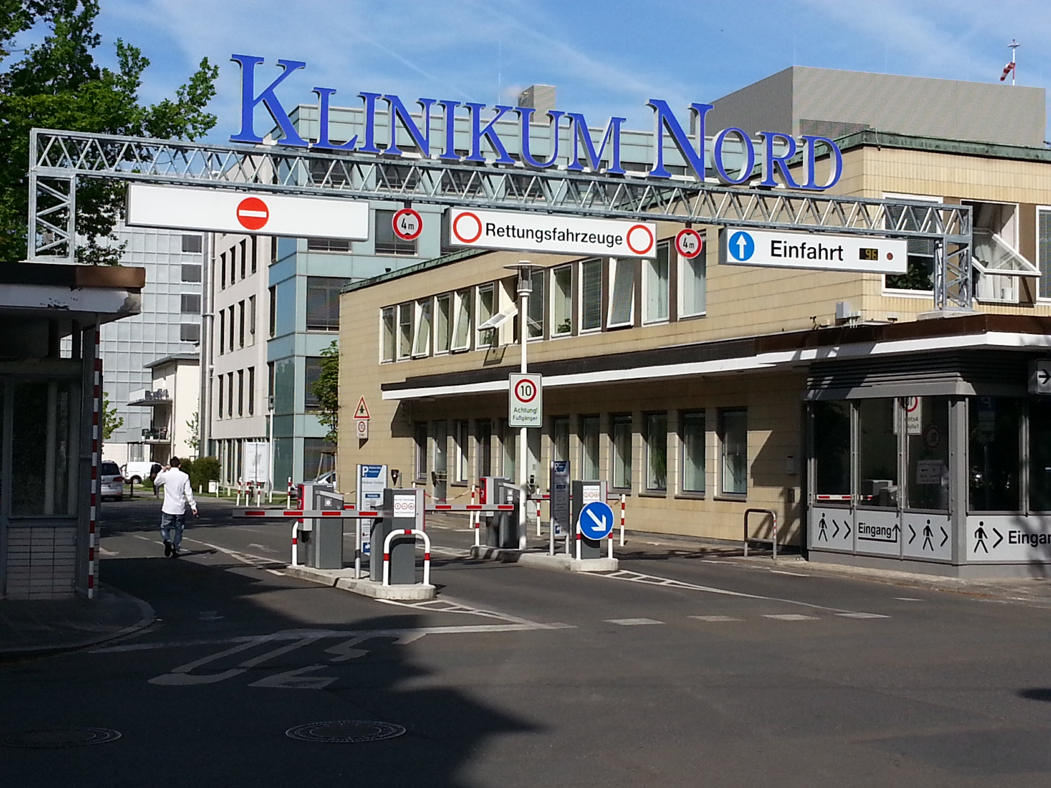 Eingang zum Klinikum Nord (2015)